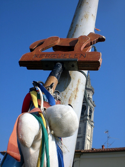 Il Totem del Branco del Voghera 1°